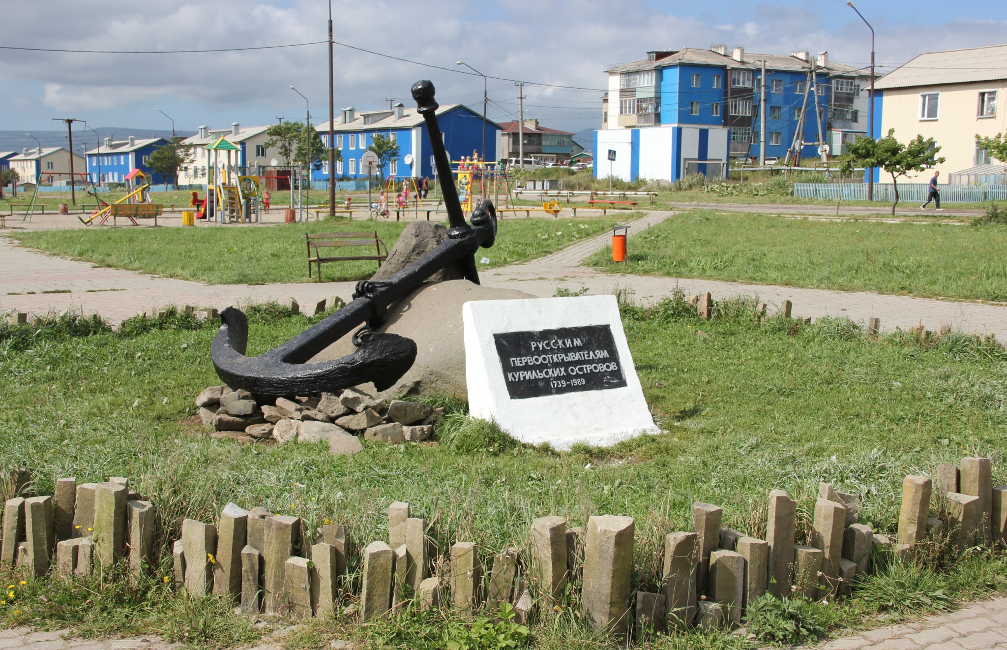 Памятник Русским первооткрывателям Курильских островов на центральной площади Южно-Курильска